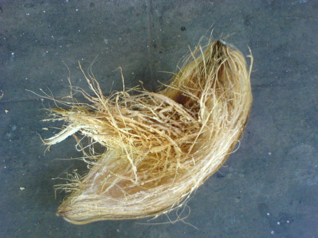 തേങ്ങയുടെ ചകിരി